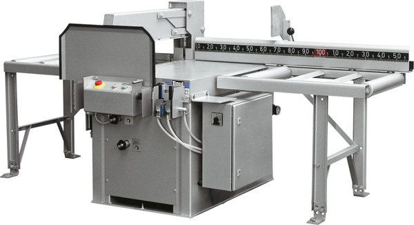 Querkreissäge zum Kürzen von Holz oder Kunststoffen